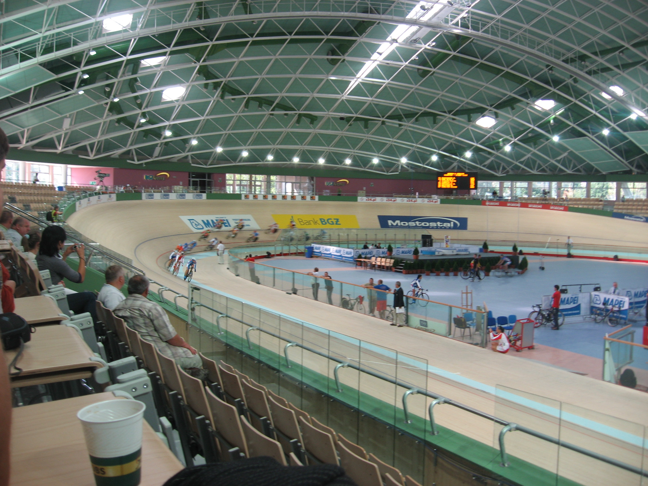 Velodrome BGŻ Arena in Pruszków